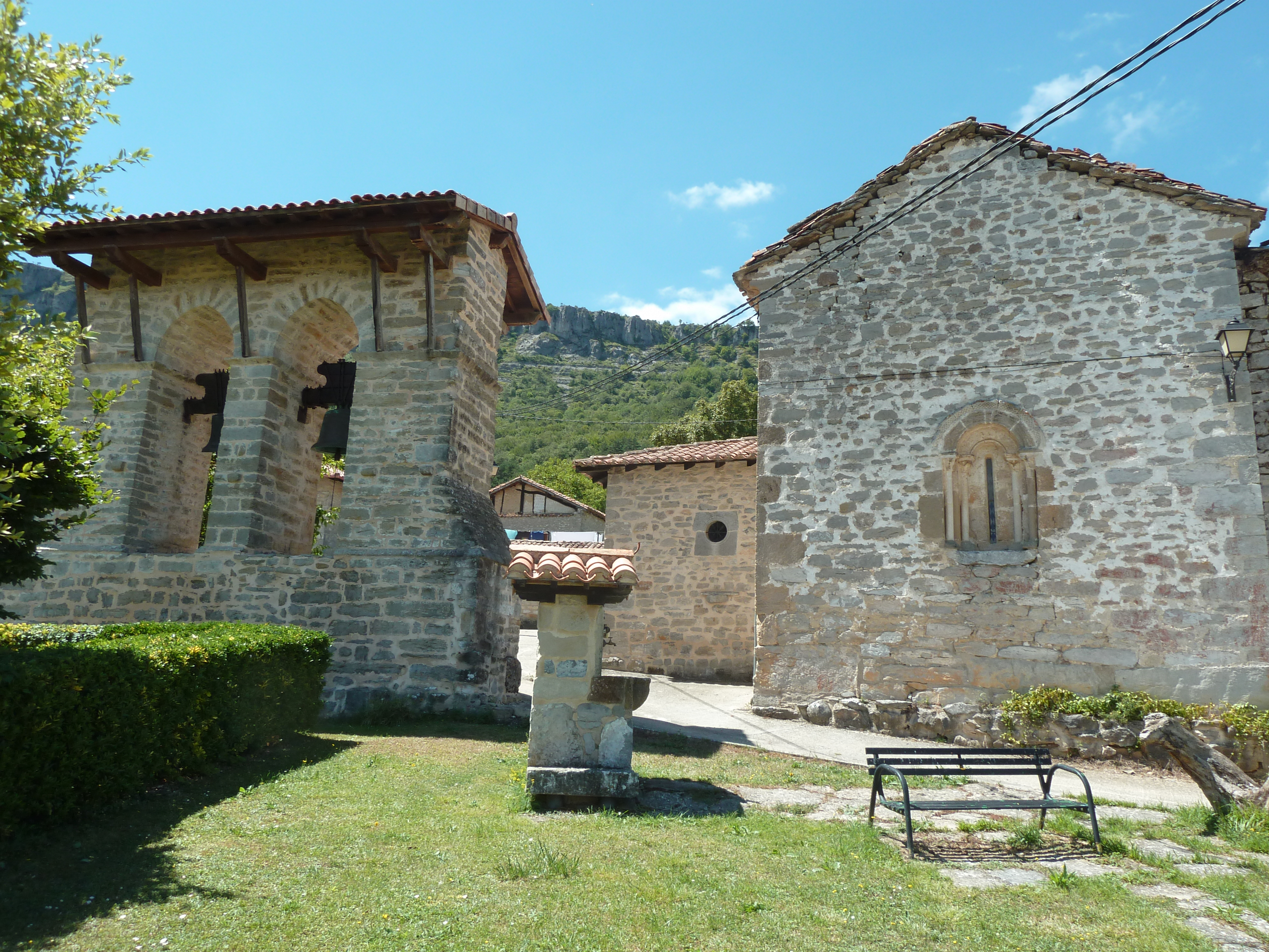 San Kiriko eta Julitaren eliza .- Uribarri (Kuartango)